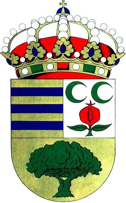 Escudo de mi pueblo, Ogíjares (Granada)